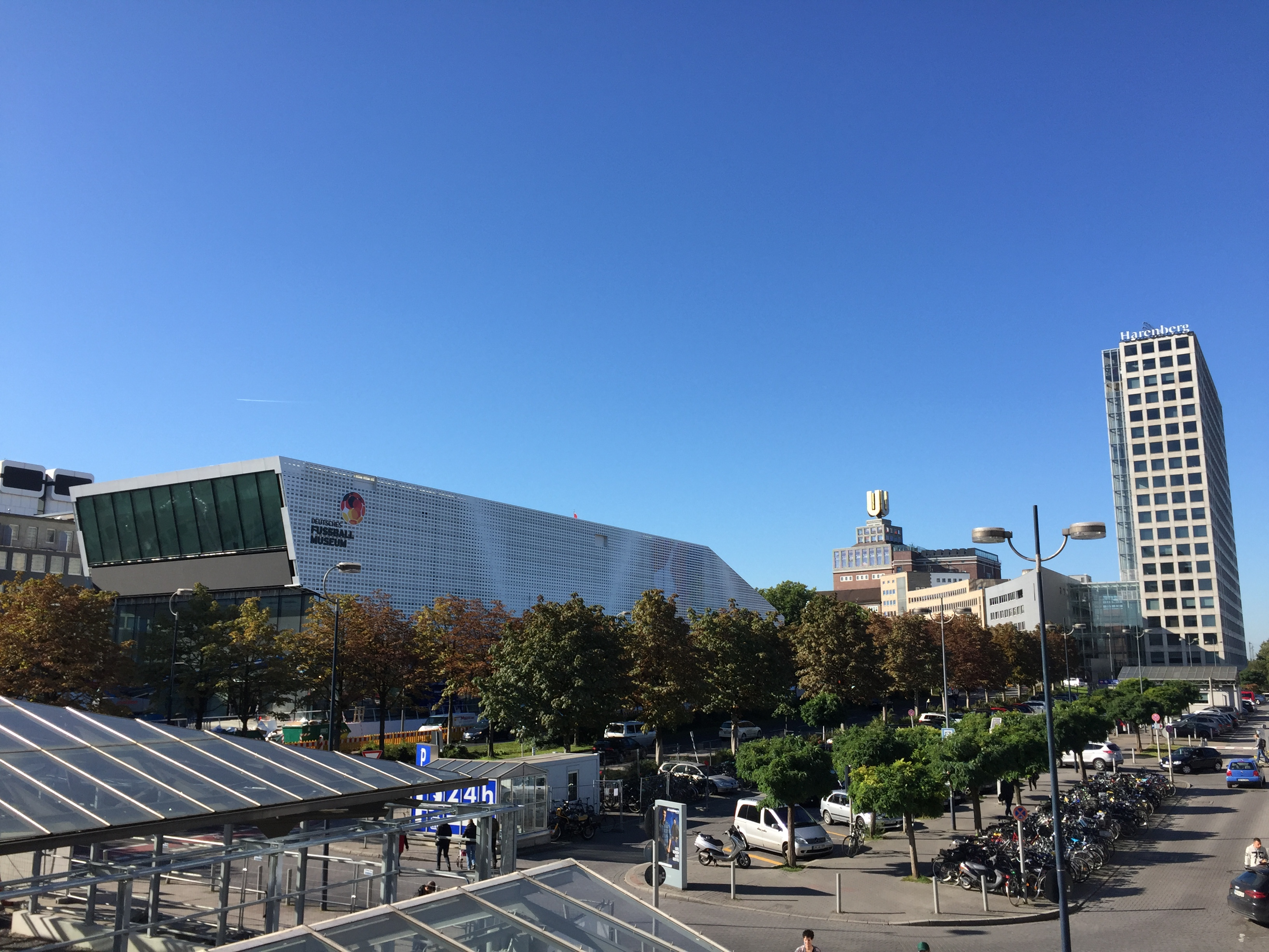 Deutsches Fußballmuseum des DFB, Blickrichtung Königswall, mittig das Dortmunder U, rechts das Hochhaus Harenberg City-Center.